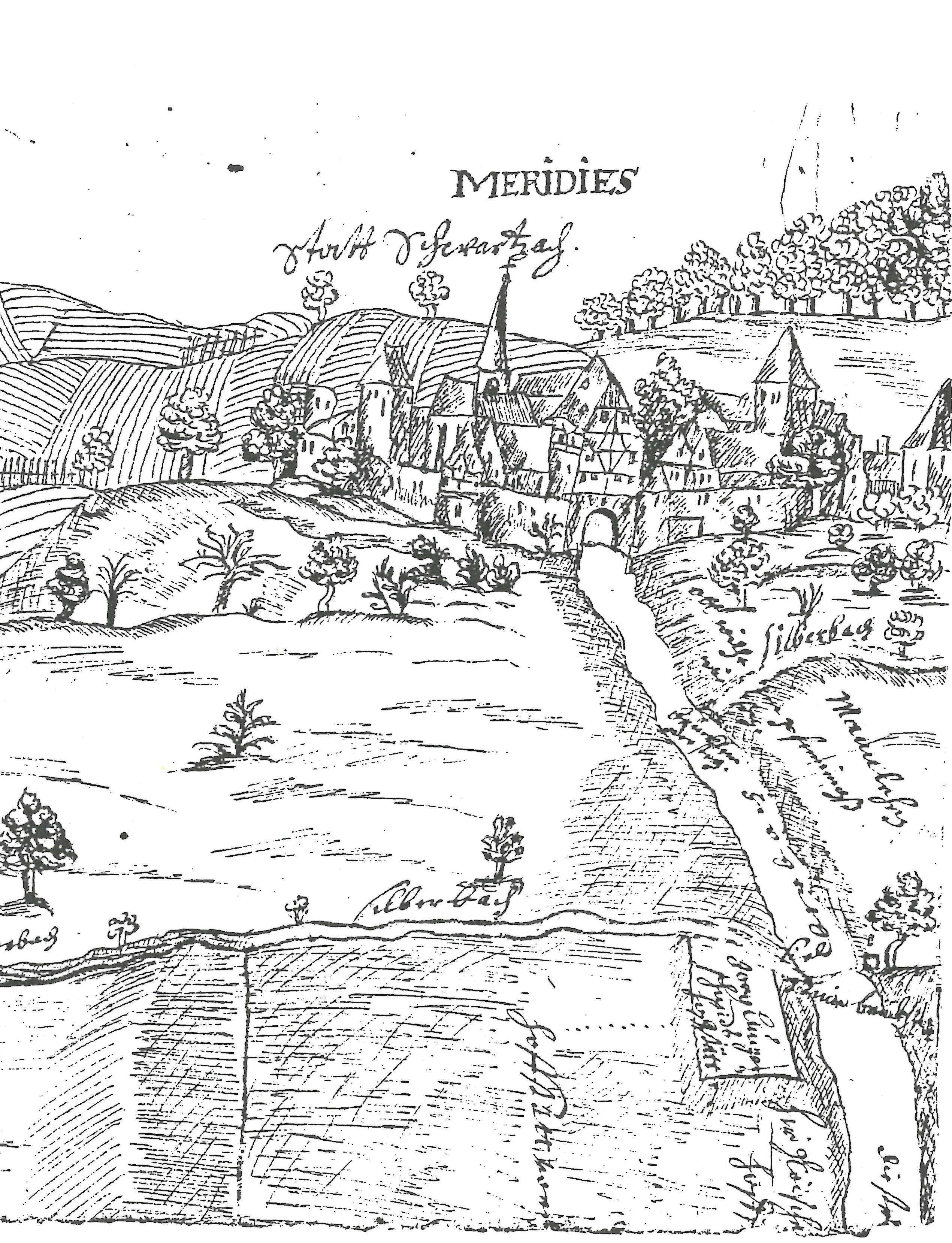 Stadtschwarzach von Norden (im Vordergrund das Schweinfurter Tor) mit Silberbach quer zur Stadt, Gemarkungsplan um 1667